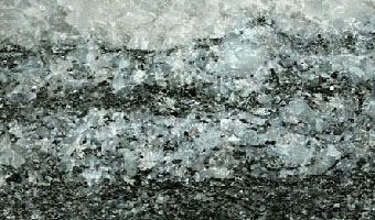 Quartz diorite - Dúbrava, Lower Tatra, Slovakia.